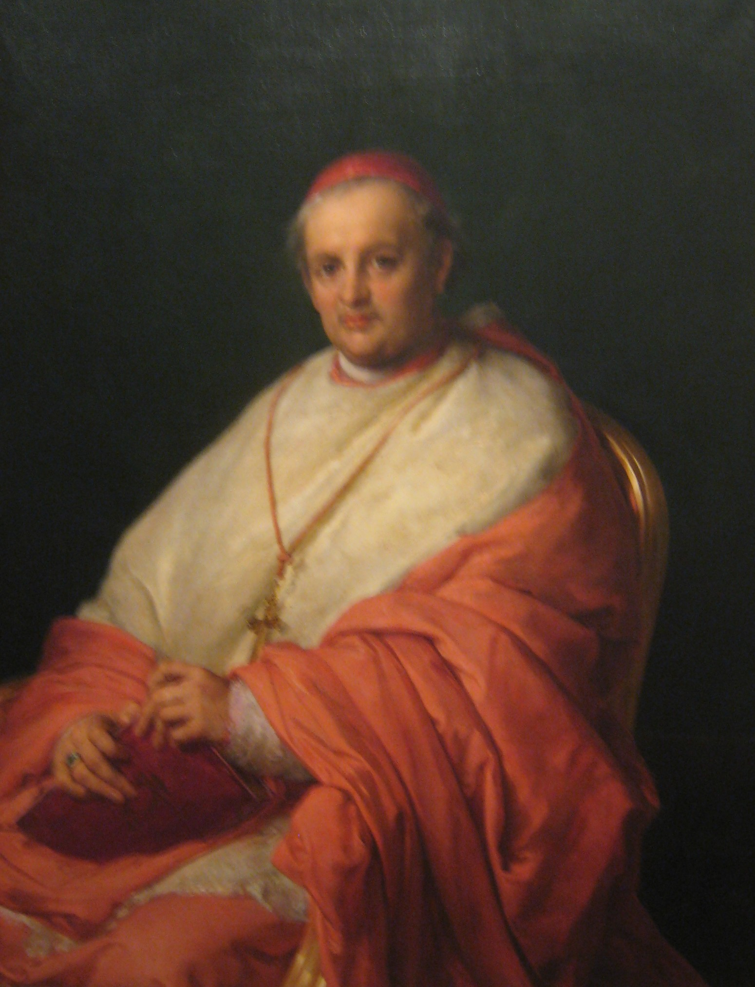 Portrait of Antonio Maria Cadolini, cardinal